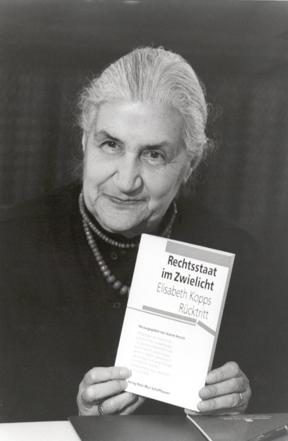 Jeanne Hersch zeigt das von ihr herausgegebene Buch Rechtsstaat im Zwielicht, Elisabeth Kopps Rücktritt, ISBN 3-85805-153-5